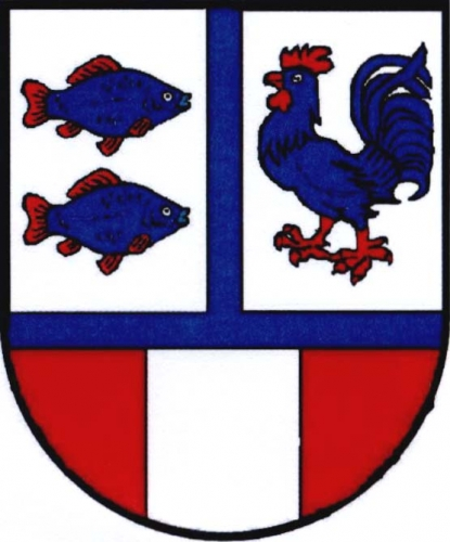 Znak, Moravičany, okres Šumperk